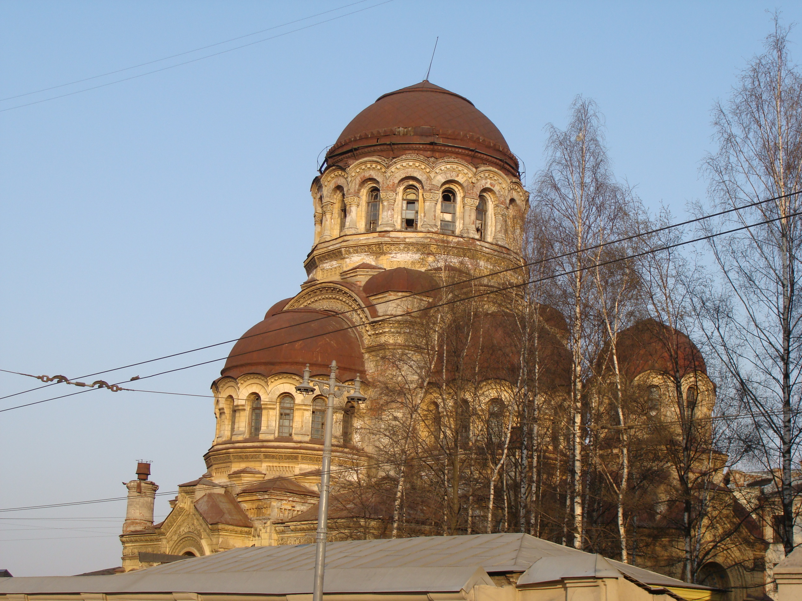 Церковь Милующей Божией Матери